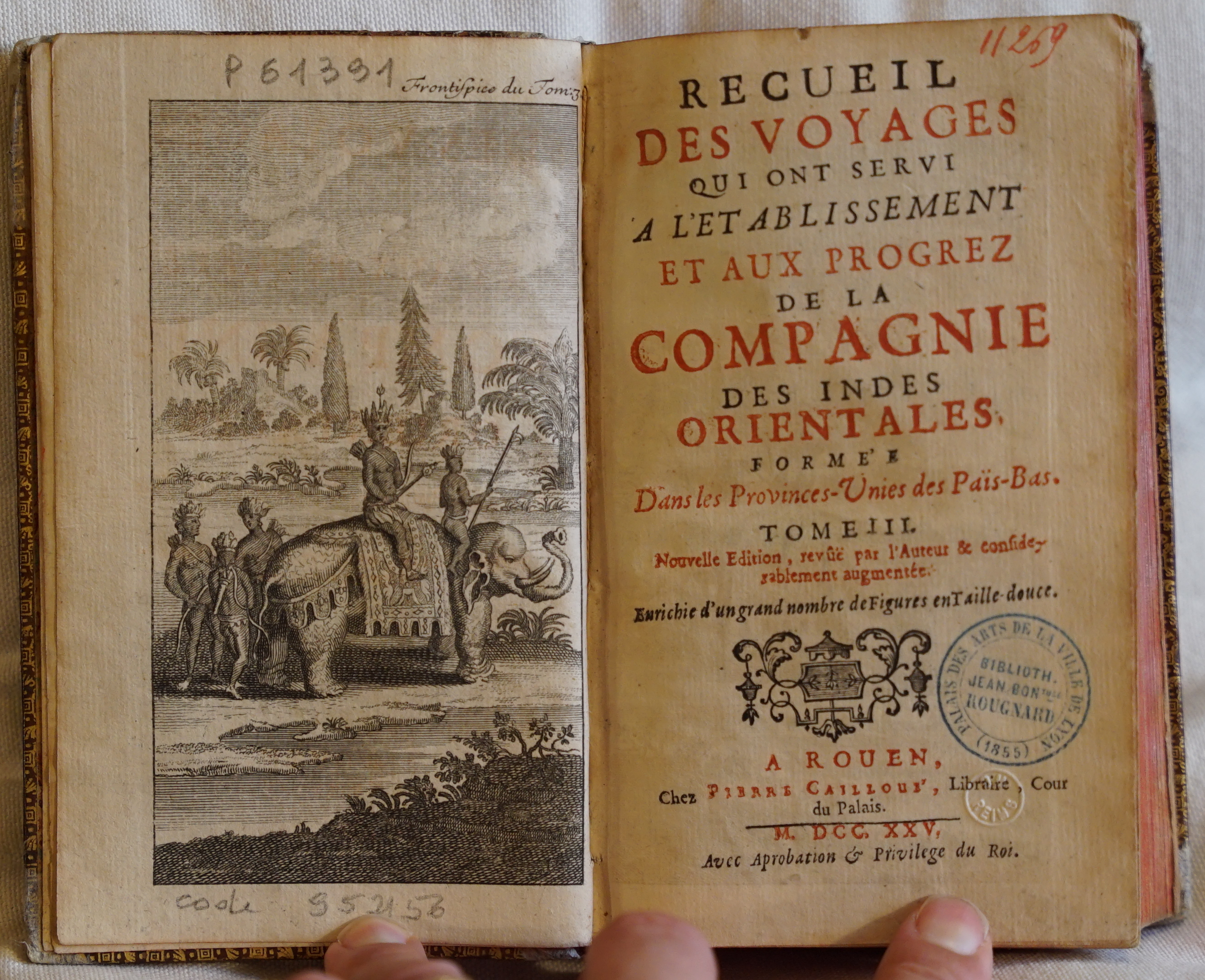 des voayges vers l'est.